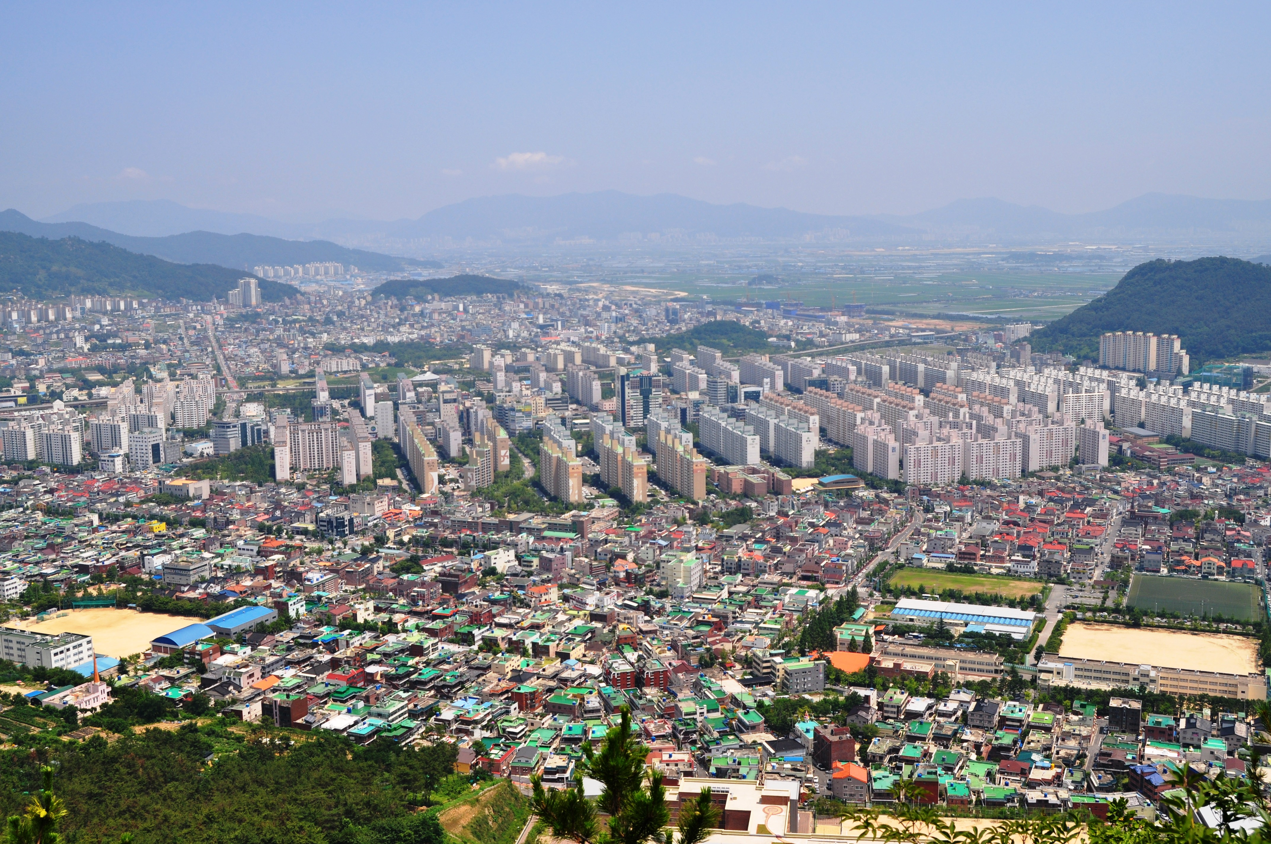 김해시 외동 일대. 경운산에서 촬영.